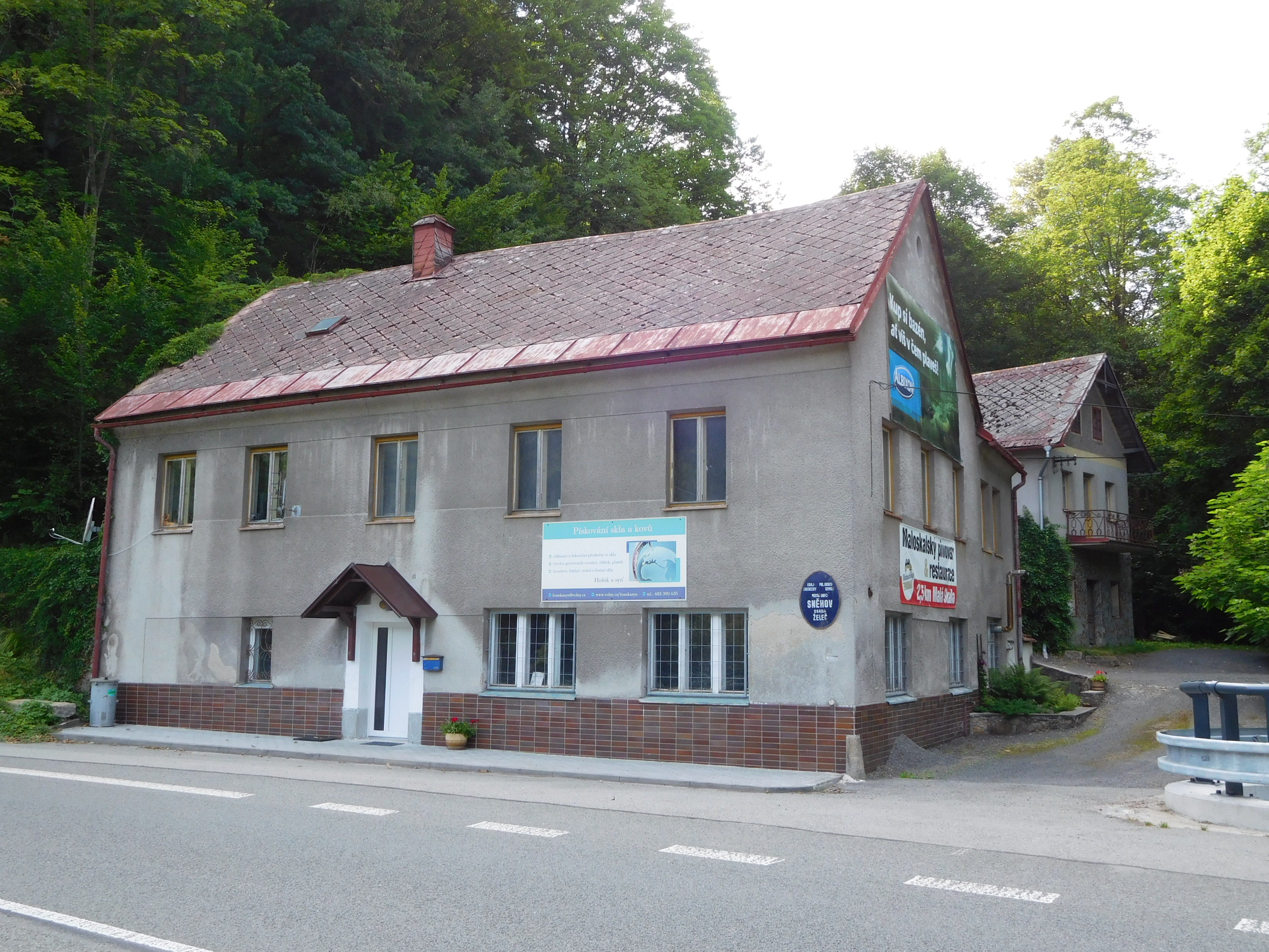 Želeč - dům č.p. 10